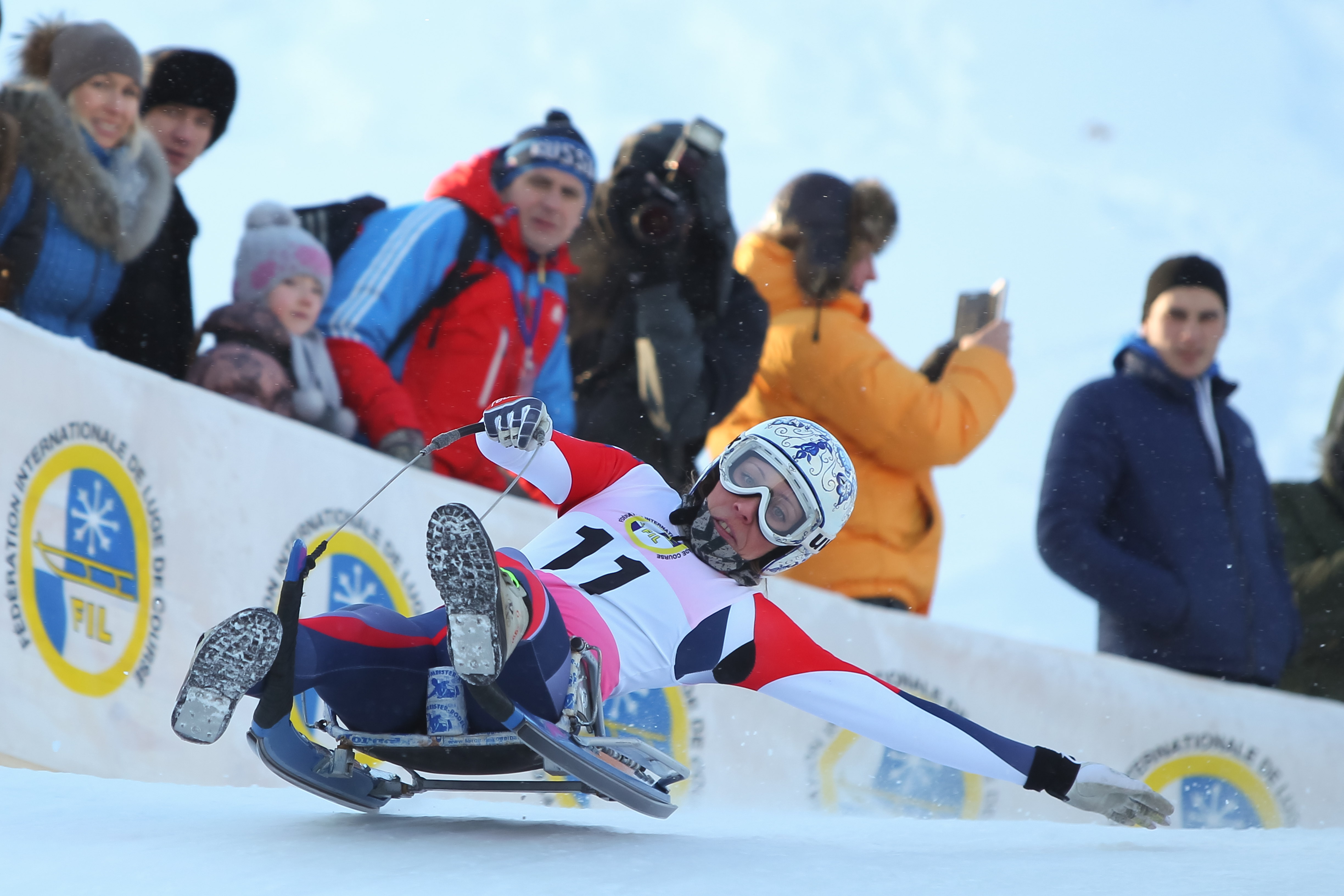 Екатерина Лаврентьева (Ekaterina Lavrentyeva) - 4-х кратная чемпионка мира, 5-ти кратная чемпионка Европы по натурбану, 50 побед на этапах Кубка мира по натурбану